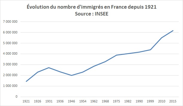 Évolution du nombre d'immigrés en France depuis 1921 Source : INSEE URL